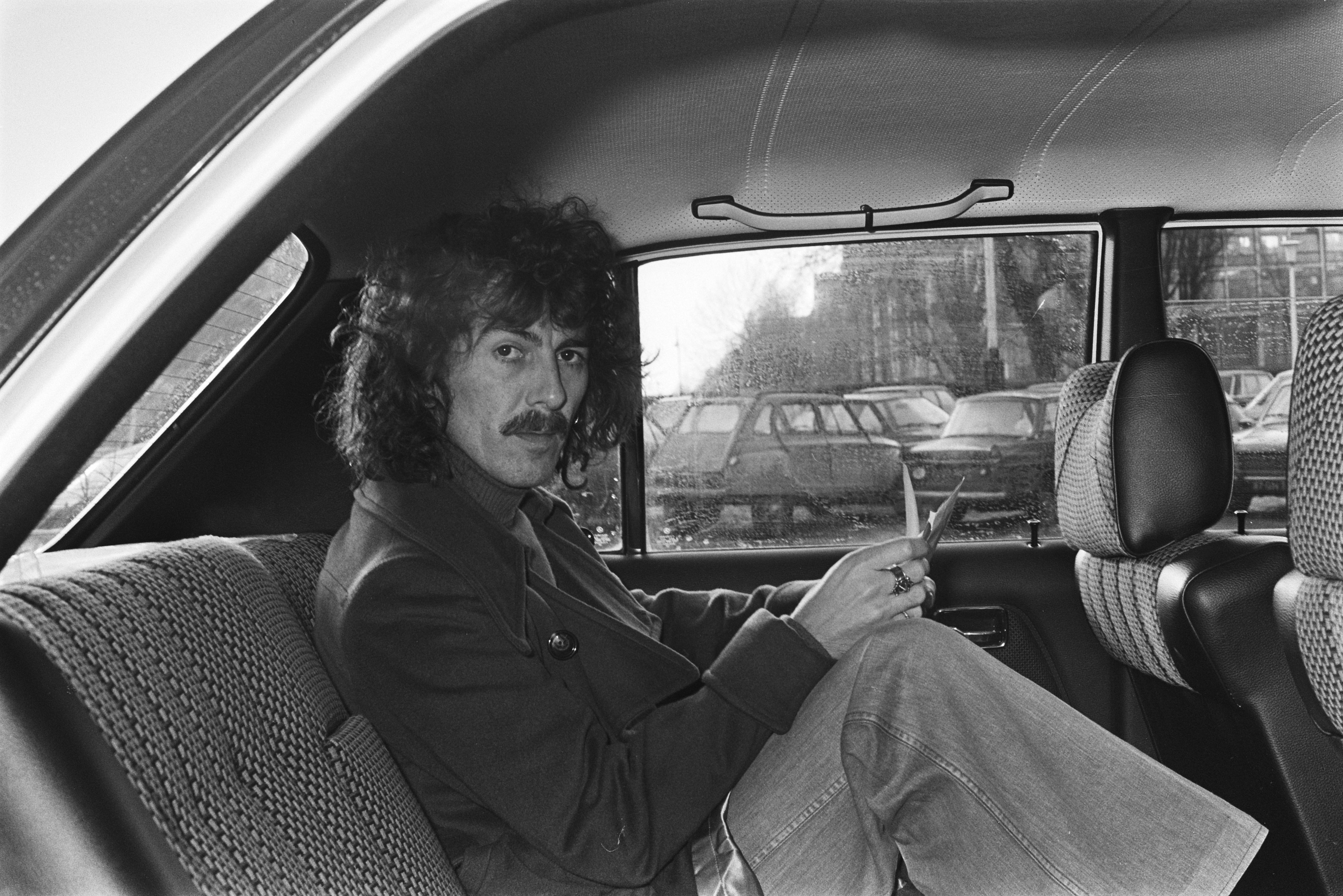 Collectie / Archief : Fotocollectie Anefo Reportage / Serie : [ onbekend ] Beschrijving : George Harrison verlaat Hilton, in auto Datum : 4 februari 1977 Persoonsnaam : George Harrison, HILTON Fotograaf : Suyk, Koen / Anefo Auteursrechthebbende : Nationaal Archief Materiaalsoort : Negatief (zwart/wit) Nummer archiefinventaris : bekijk toegang 2.24.01.05 Bestanddeelnummer : 929-0118